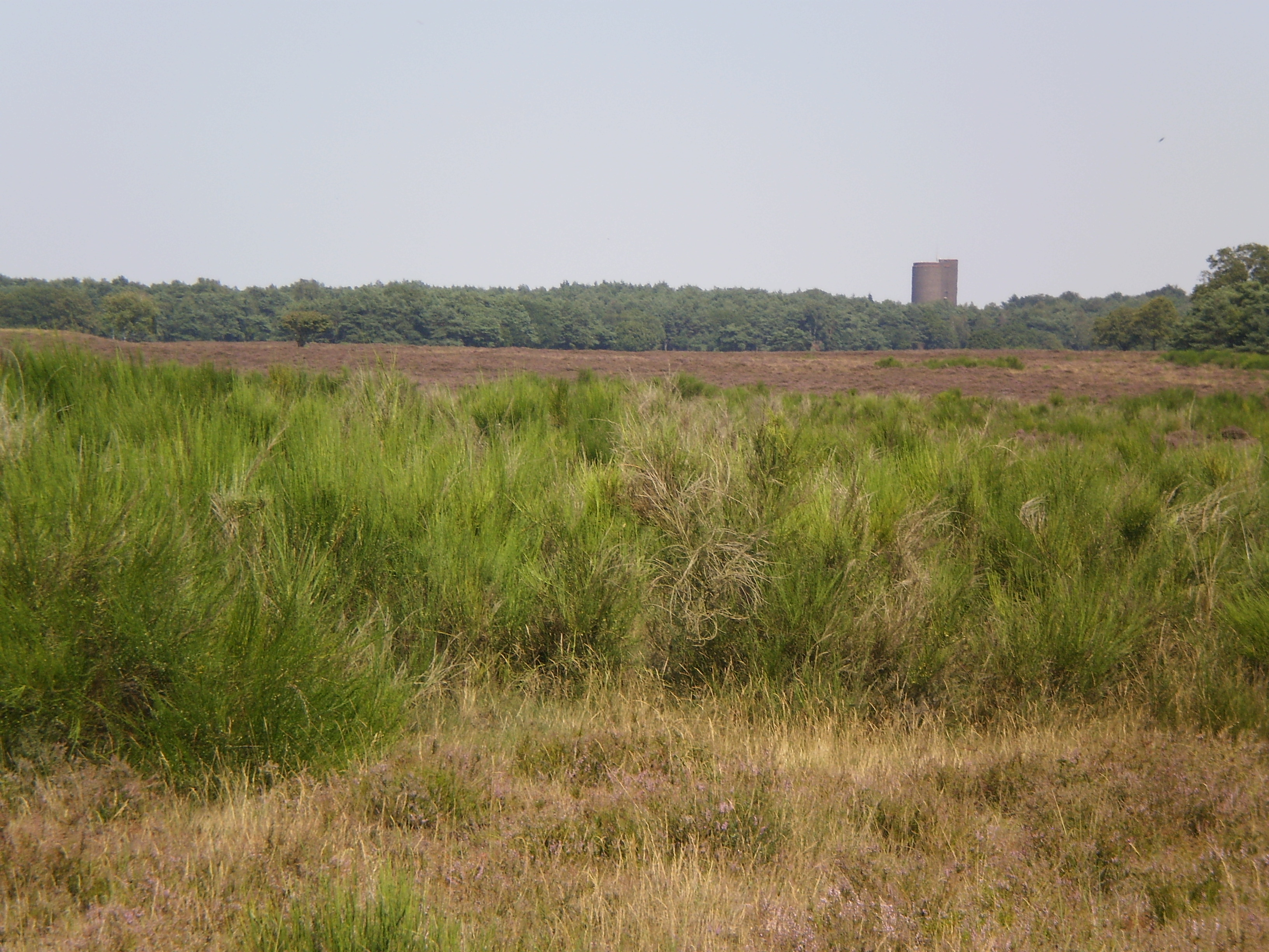 Foto oanbean troch Swarte Kees op 6 augustus 2009